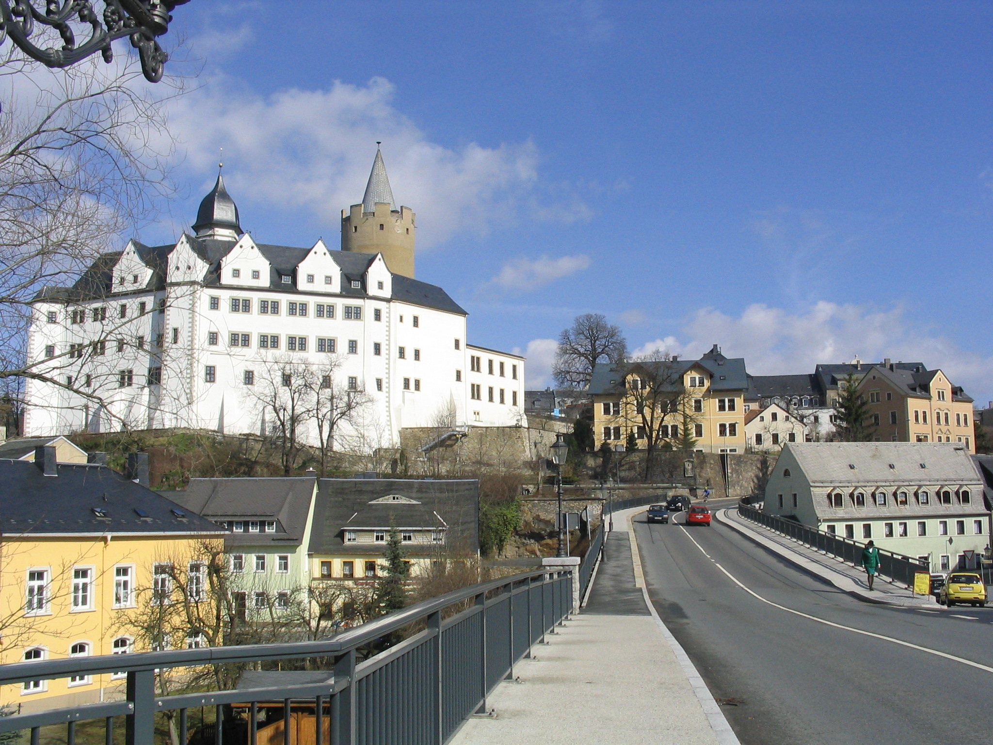 Blick von der der Zschopaubrücke auf Schloß Wildeck und die Stadt Aufgenommen am 15.04.2006 von Dr. Hagen Graebner